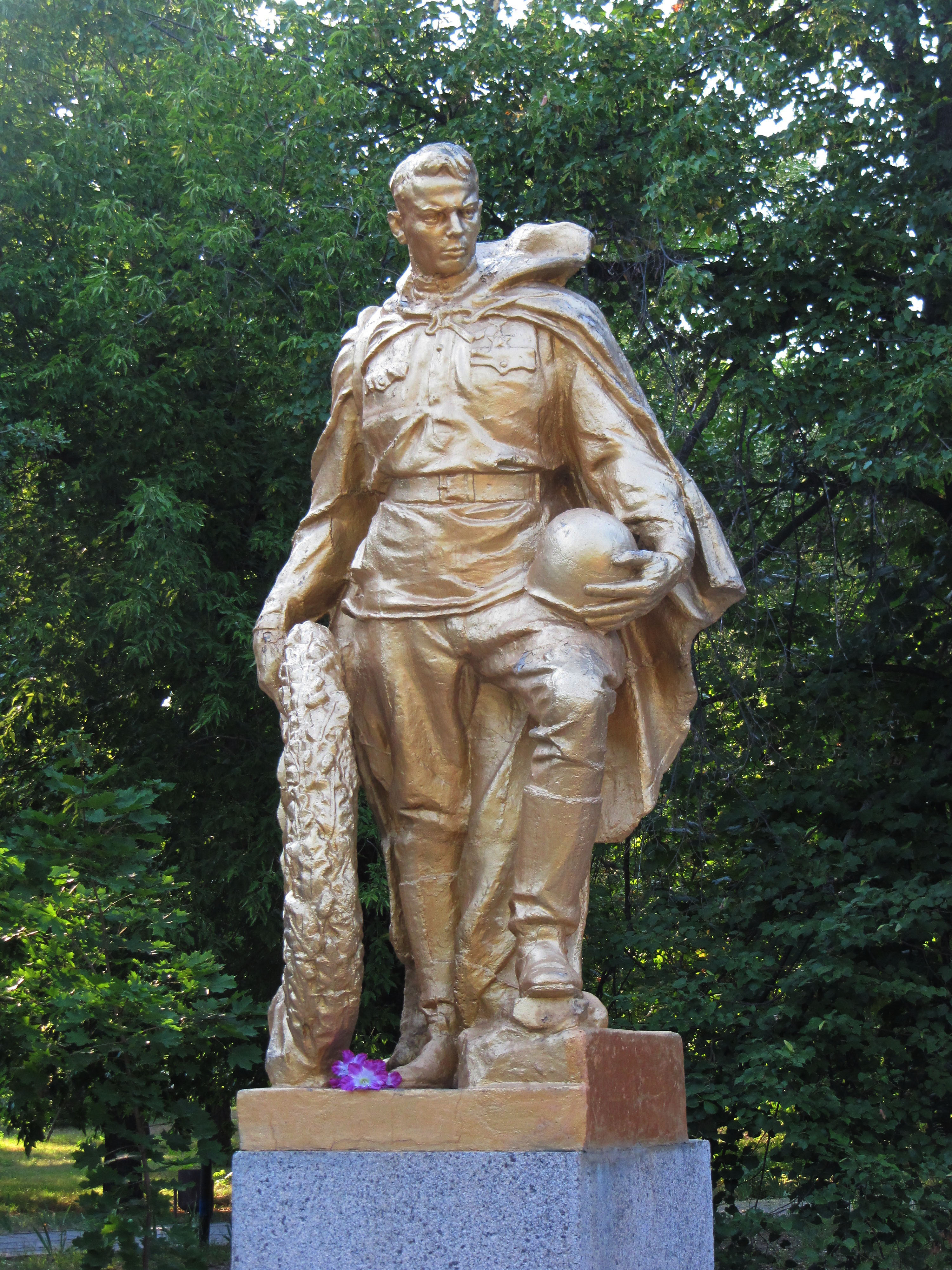 Воїнам-визволителям міста Вознесенська Миколаївська весна у Вікіпедії